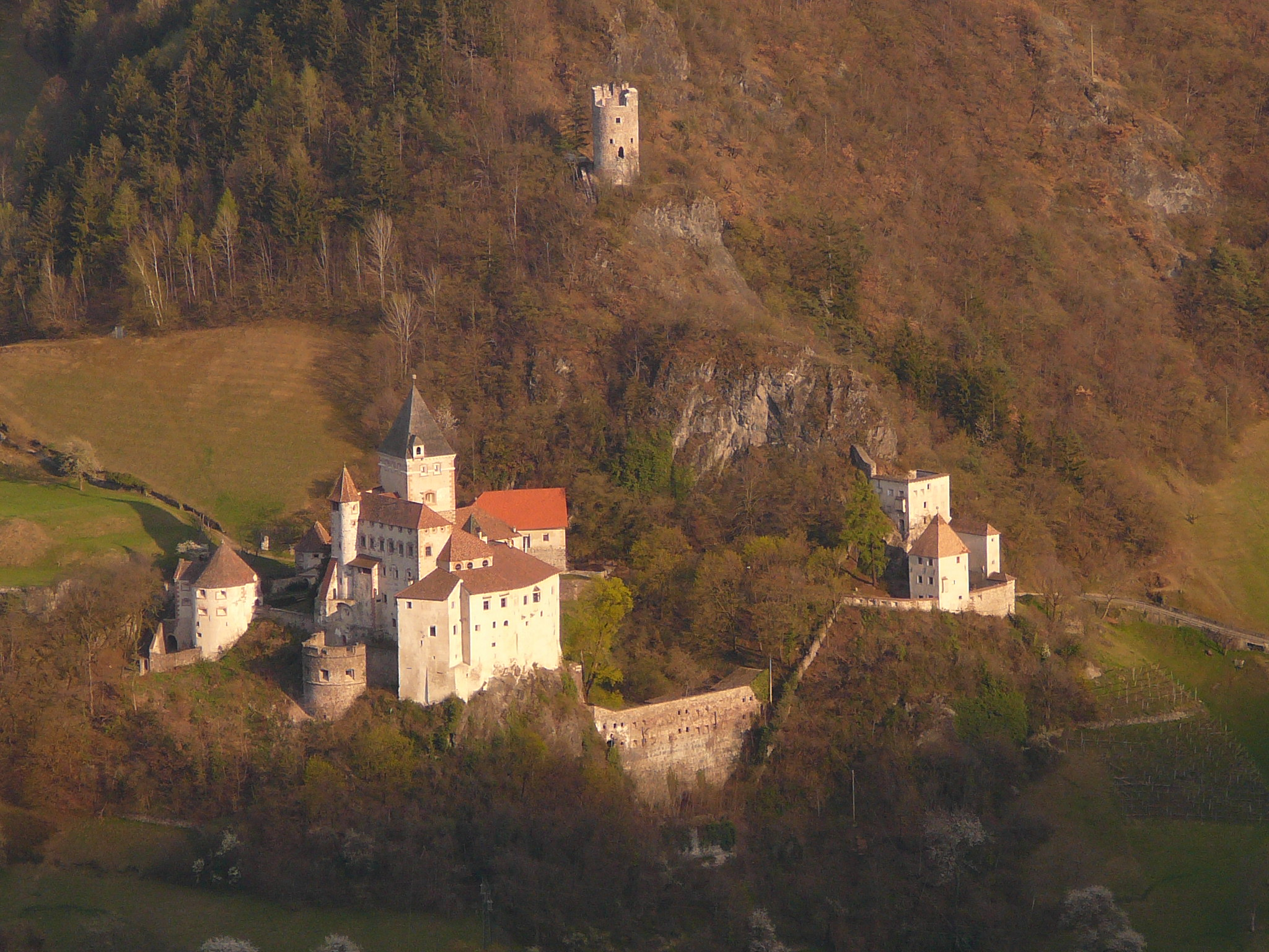 Trostburg in Südtirol